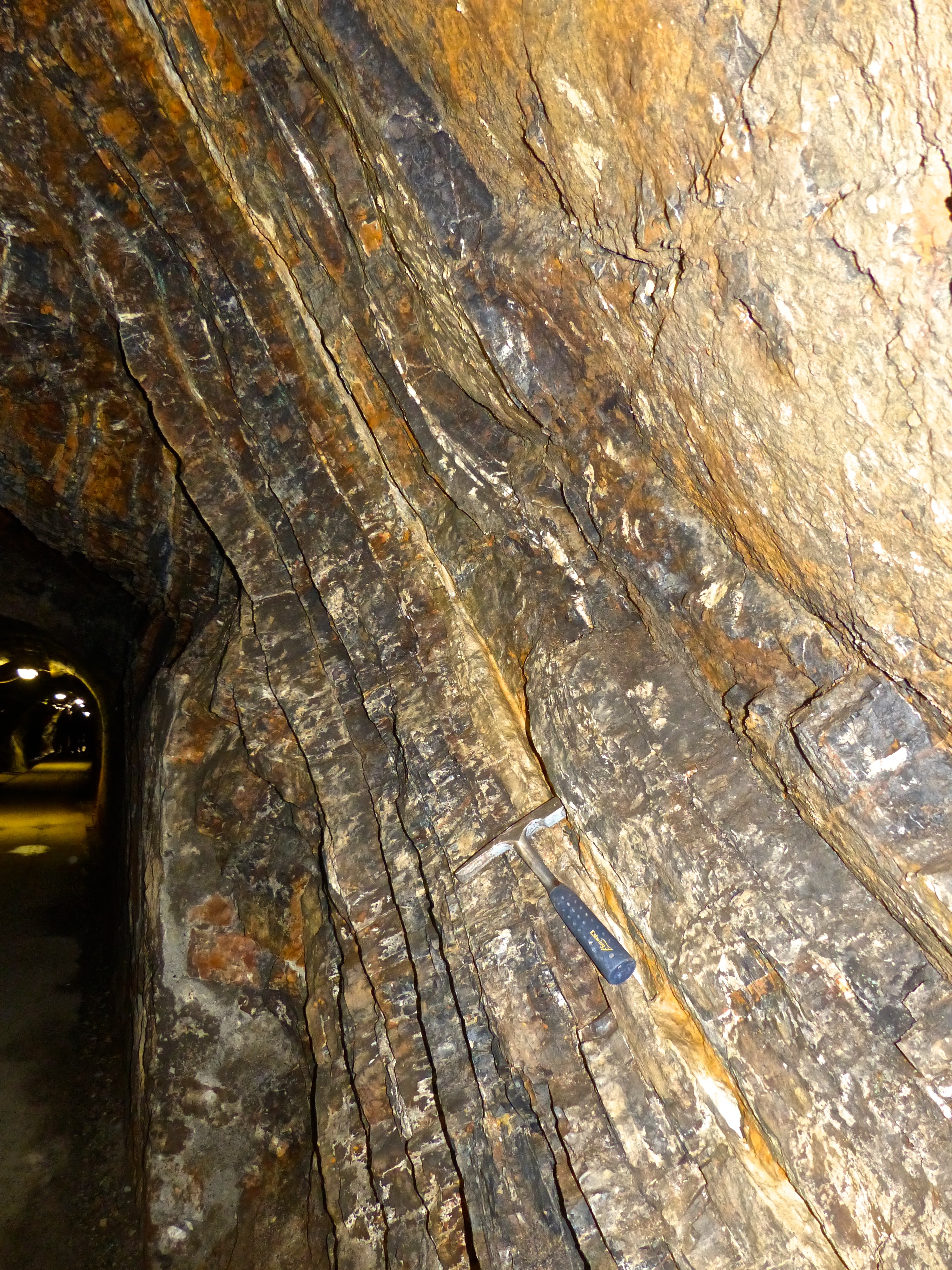 Kilianstollen ( Grube Oskar): unterkarbonischer Kieselschiefer mit zu Bentonit zersetztem Tuff (hell) in steiler Lagerung